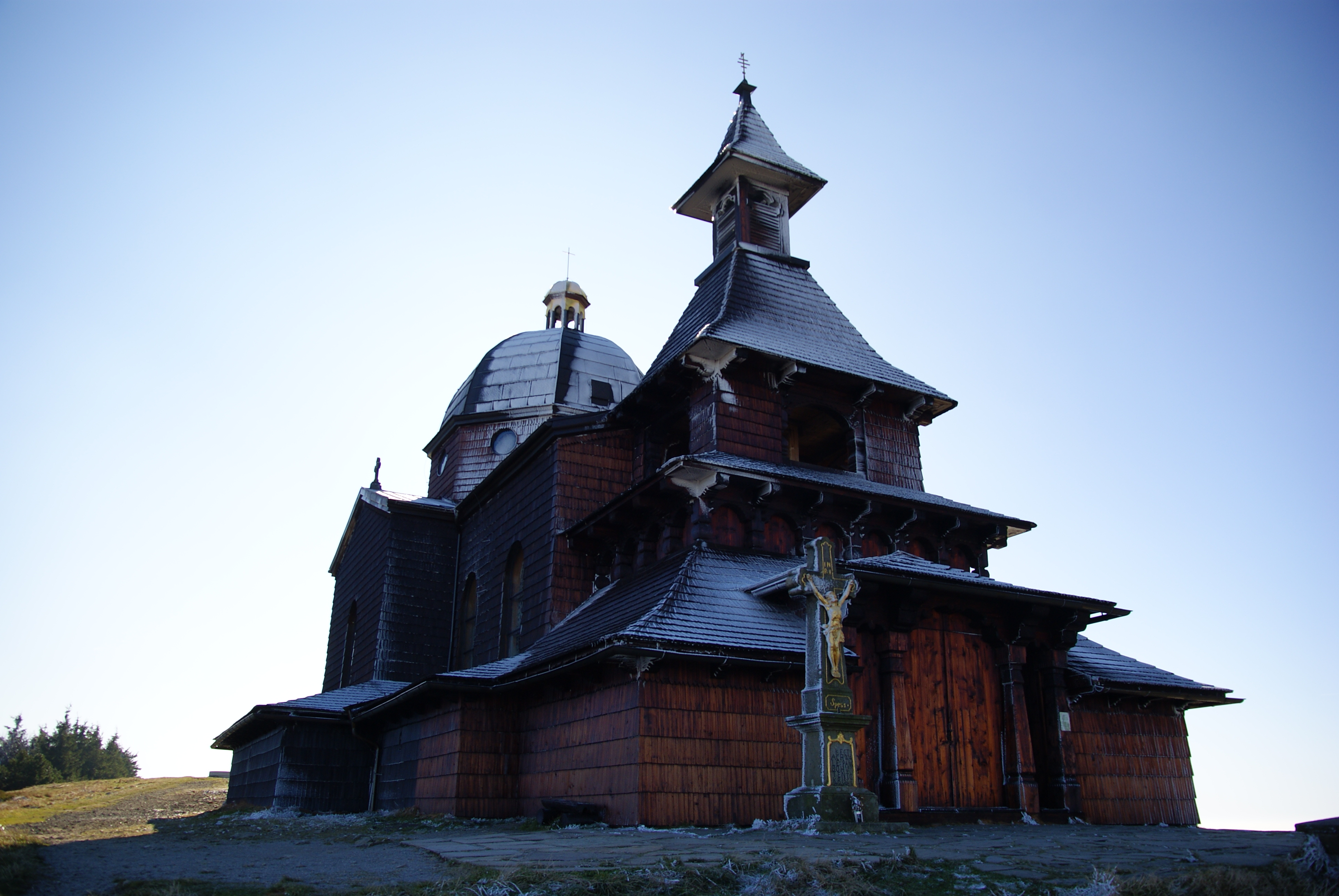 Kaple sv. Cyrila a Metoděje (Dolní Bečva), Radhošť, Dolní Bečva